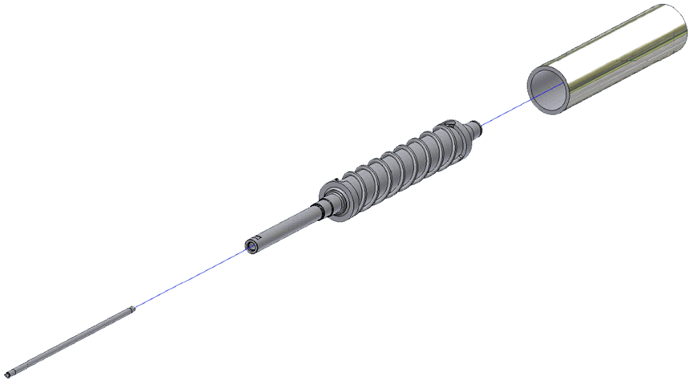 Dartellung einer Heiz- und Kühlwalze